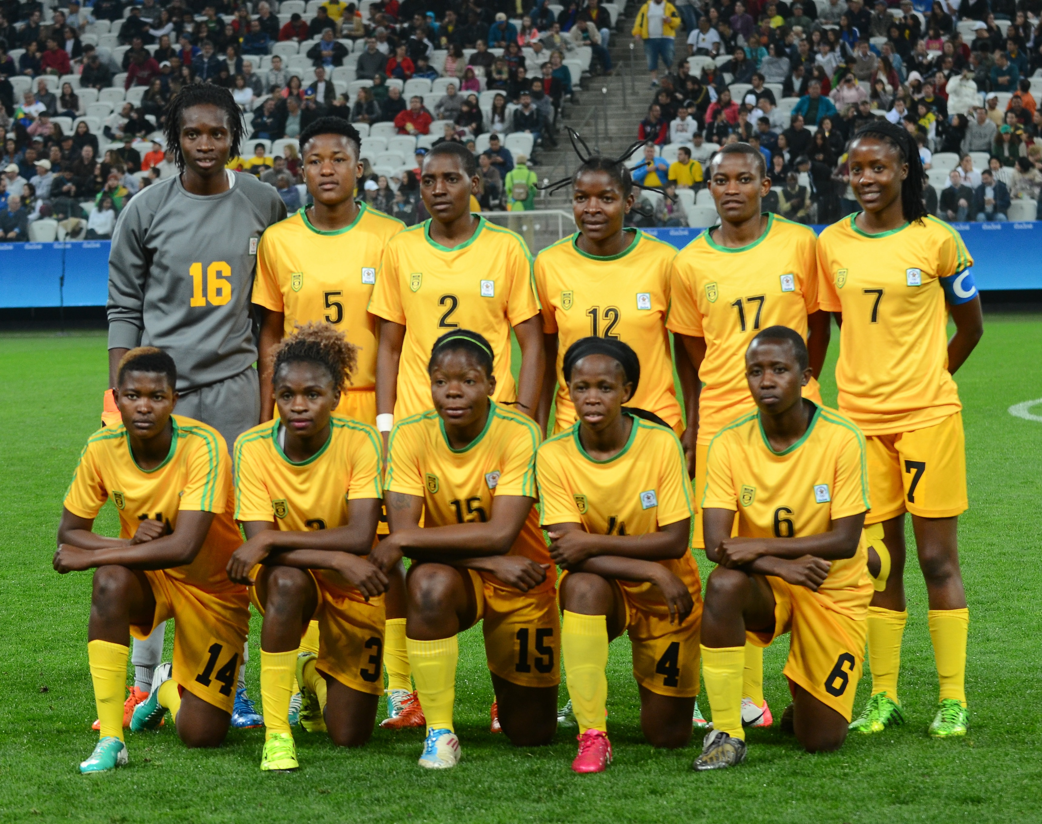 São Paulo - Seleções femininas do Zimbábue e da Alemanha se enfrentam na Arena Corinthians (Rovena Rosa/Agência Brasil)